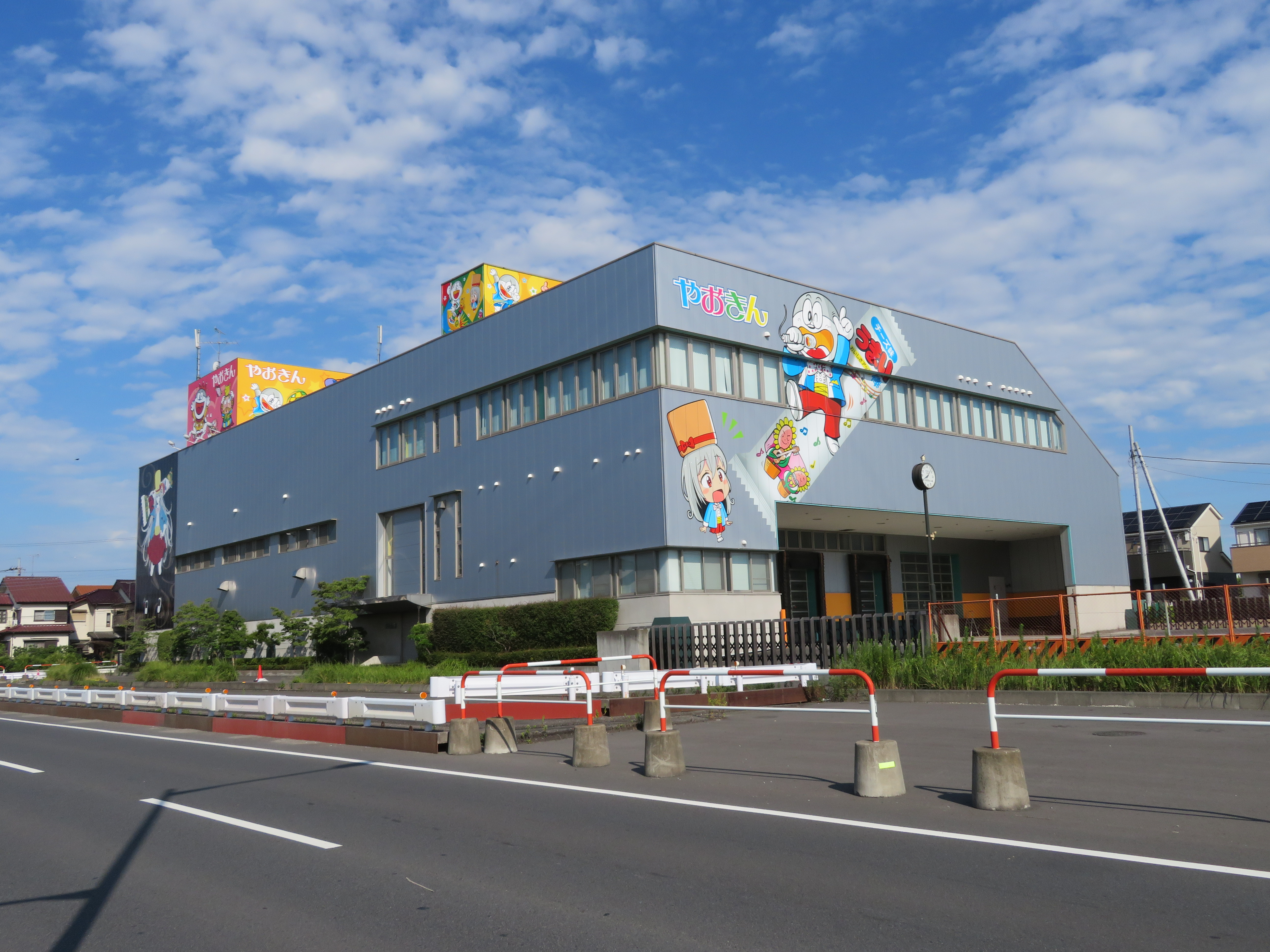 埼玉県八潮市に所在する株式会社やおきん八潮営業本部 Canon PowerShot SX720 HS